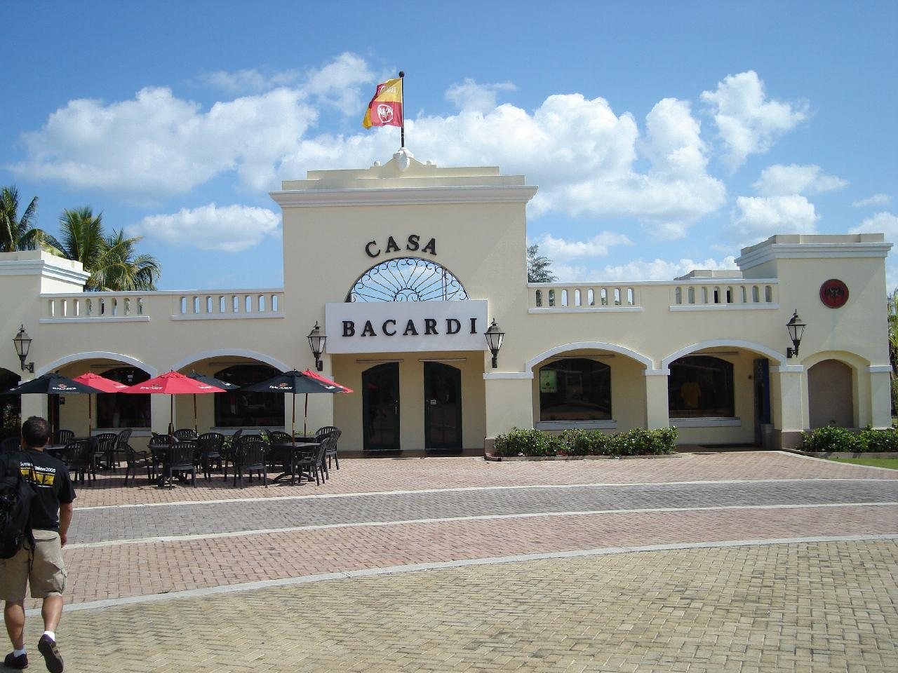 Casa Bacardi in Cataño, Puerto Rico